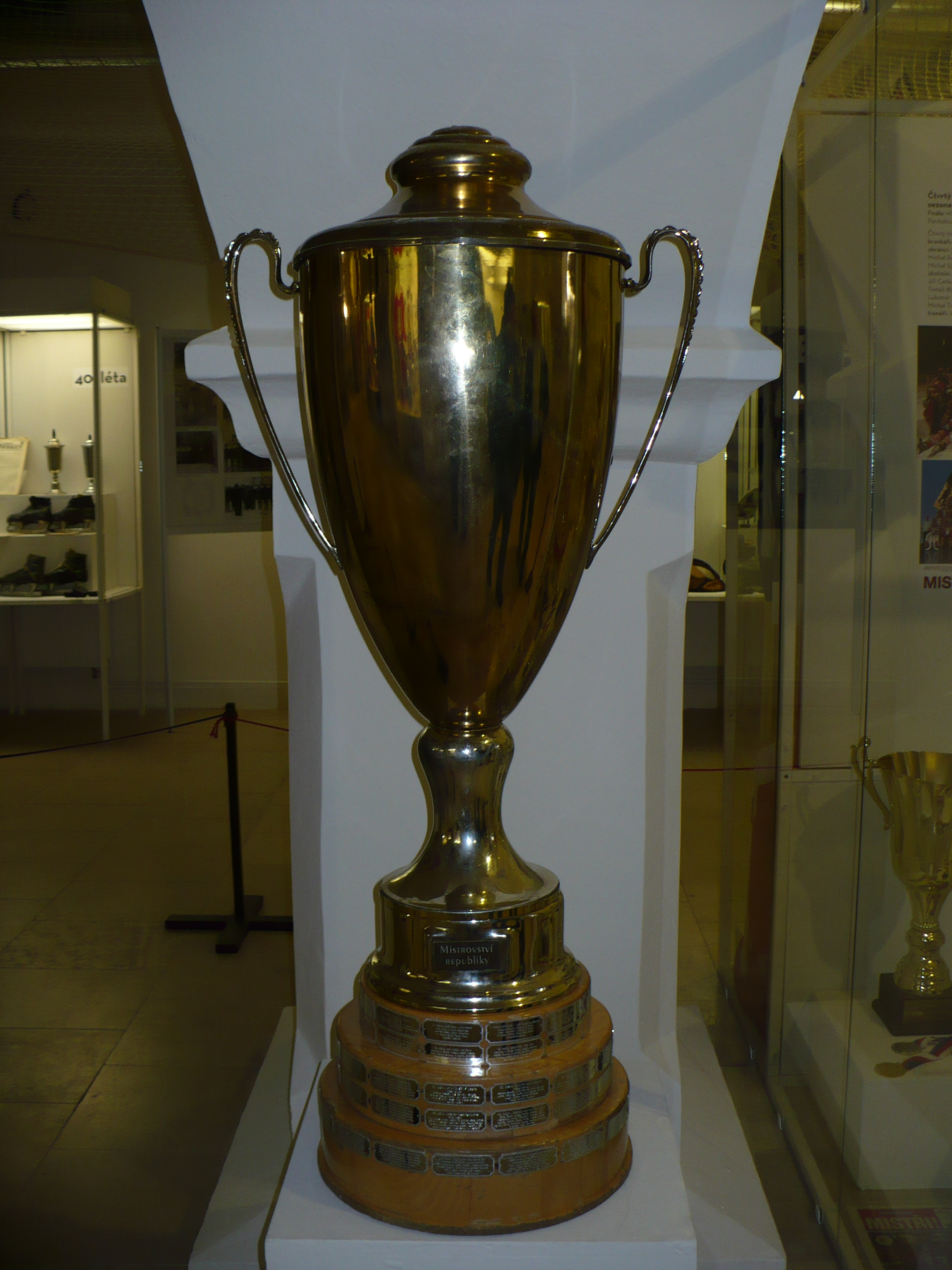 Pohár pro Mistra České republiky v ledním hokeji